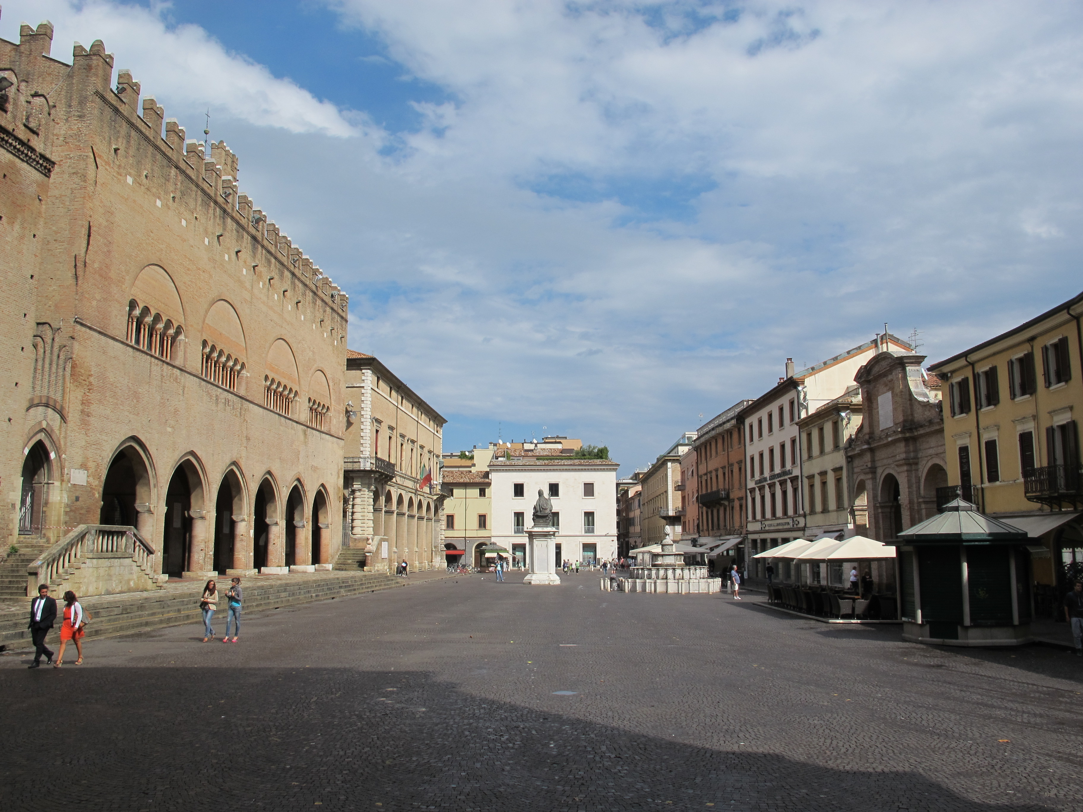 Piazza Cavour - MIBAC This is a photo of a monument which is part of cultural heritage of Italy.